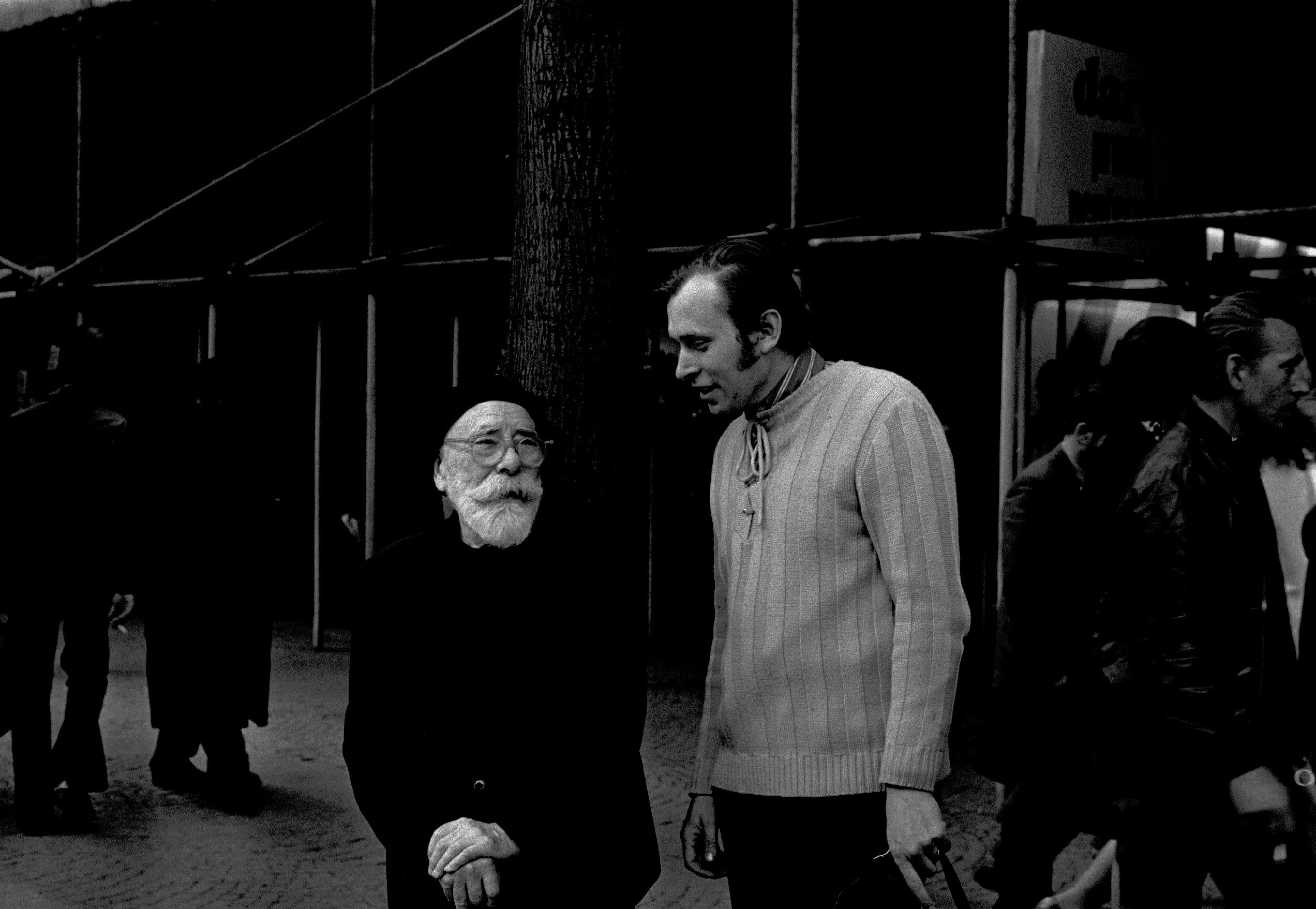 Jan Zrzavý a Vladimír Vojíř ze 70. let